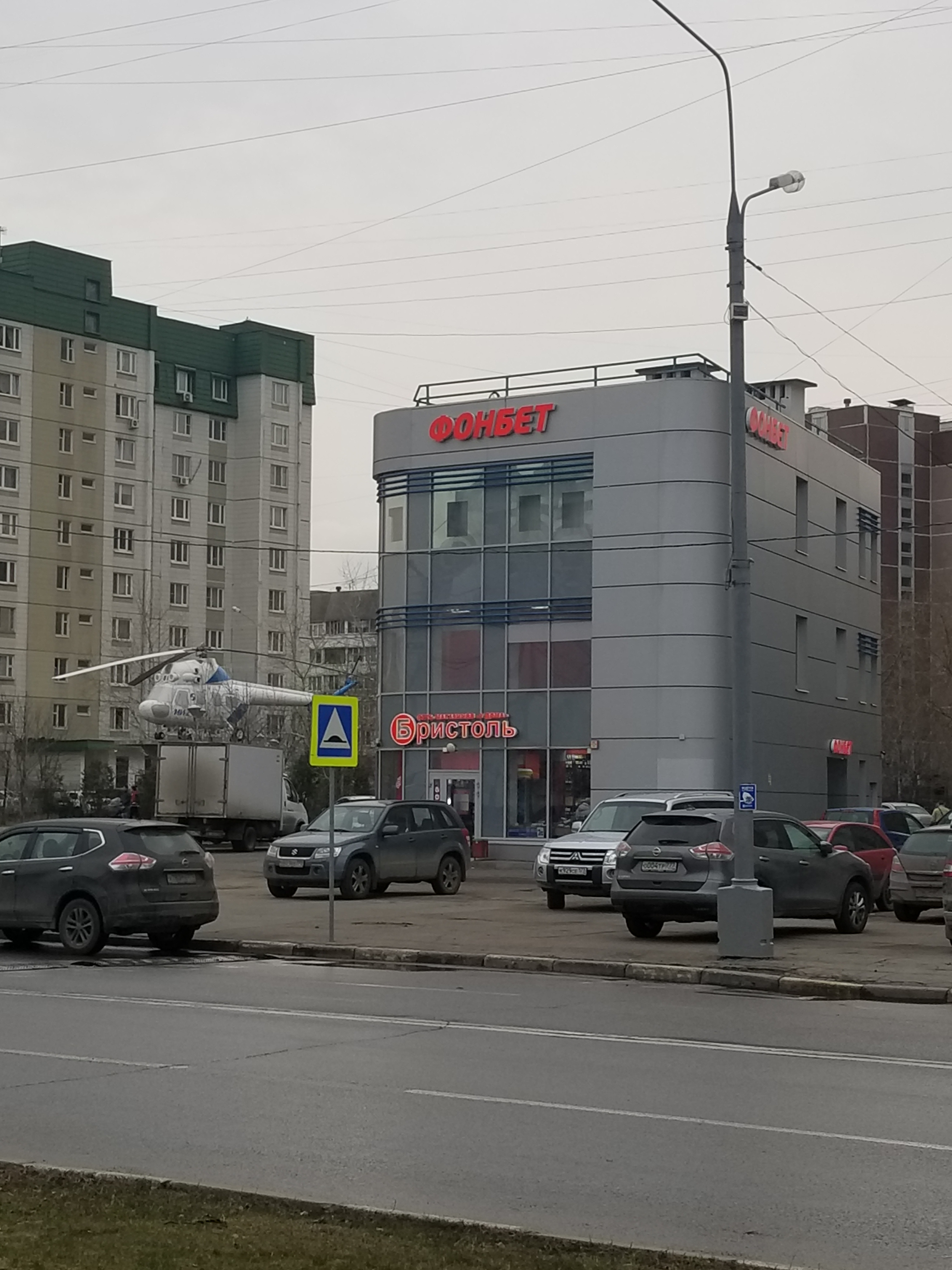 Магазин сети «Бристоль» и букмекерская контора «Фонбет» на улице Авиаконструктора Миля в Москве